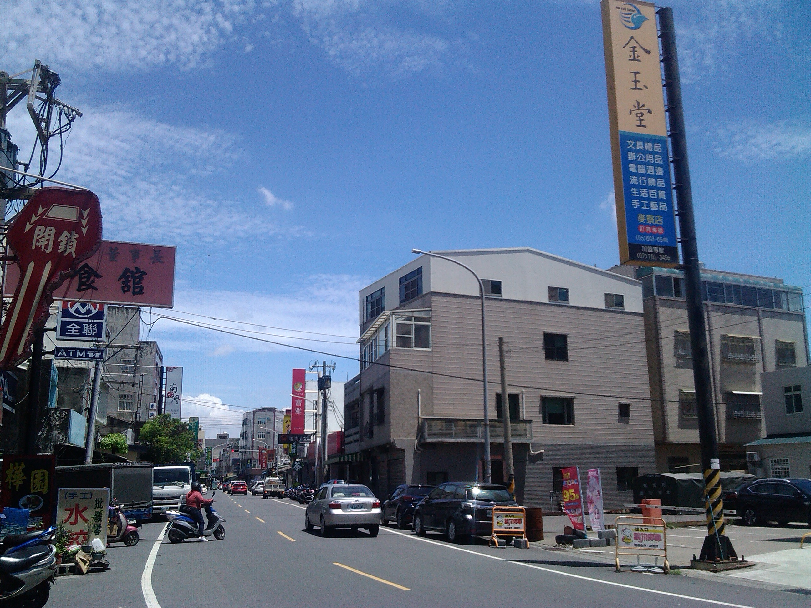 為市中心的主幹道 超商、金玉堂、全聯、寶雅及省錢超市皆設置於此